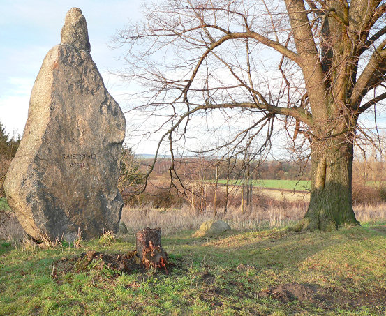 Gedenkstein und markante Linde auf dem Gelände der Pfalz Werla